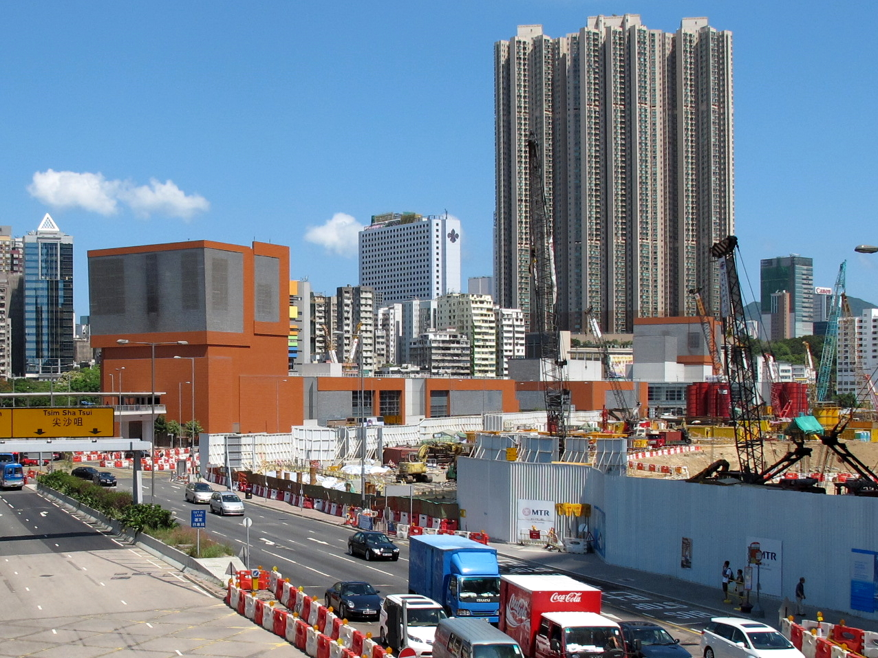 Austin Station Outside View 柯士甸站